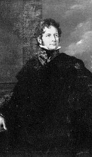 Foto av oljemaleri av Fredric Westin (1782-1862) 1825.